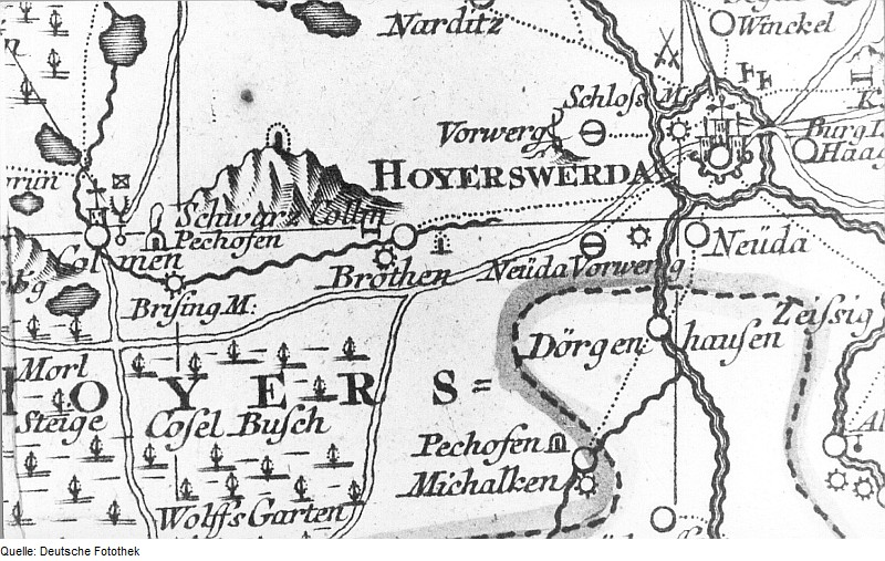 Original image description from the Deutsche Fotothek Hoyerswerda-Bröthen-Michalken. Oberlausitzkarte, Schenk, 1759